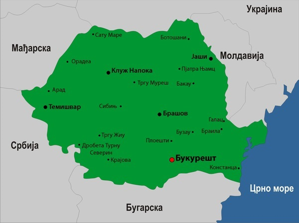 Мапа Румуније